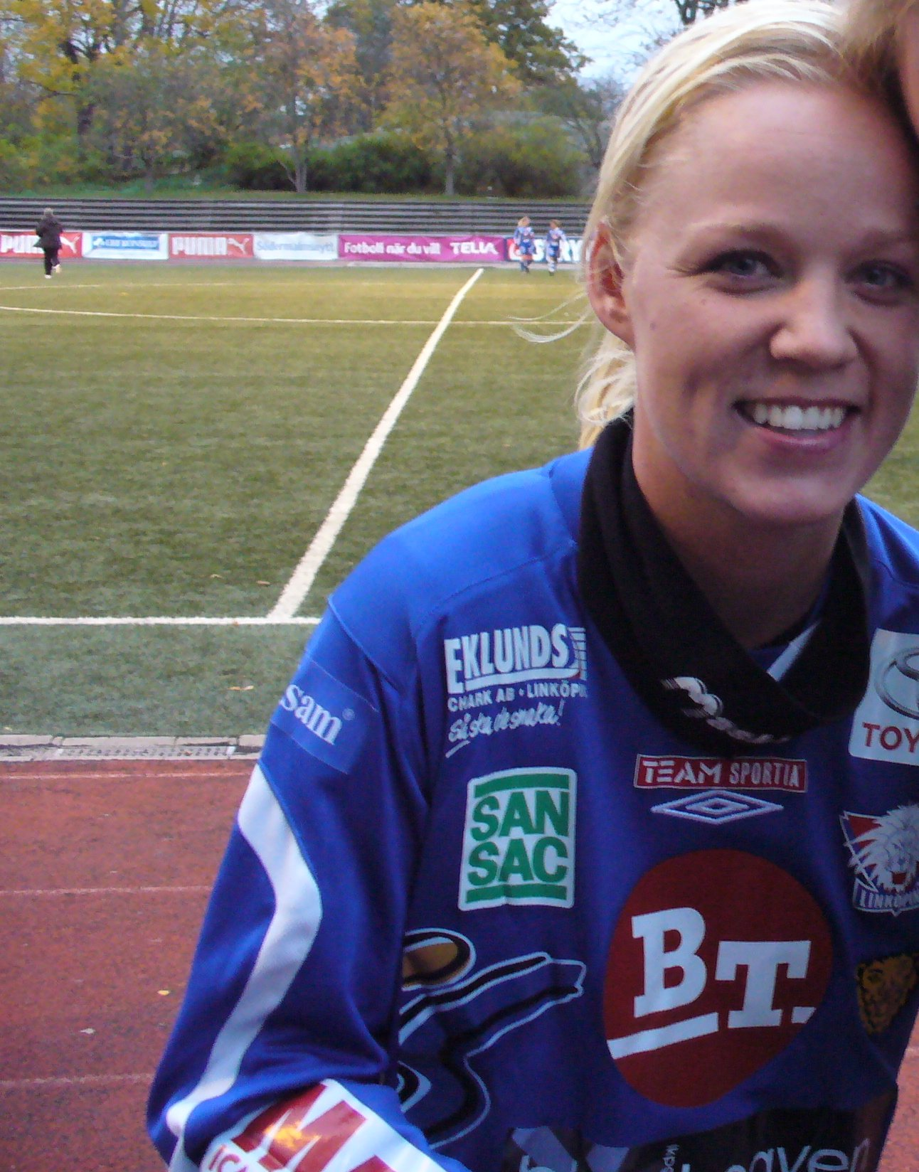 Caroline Seger, Linköpings FC, after a game against Hammarby